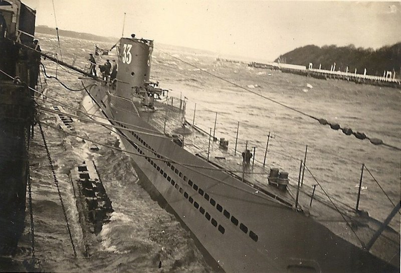 Deutsches U-Boot U 35 der Kriegsmarine (1936 - 1940).